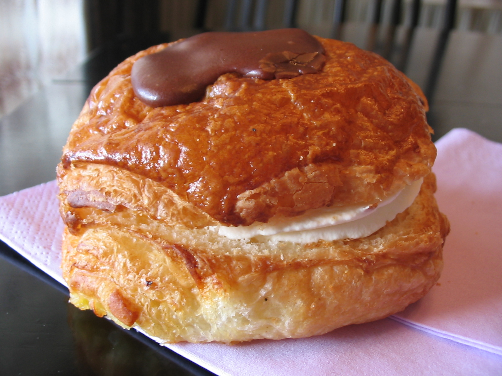 Fastelavnsbolle